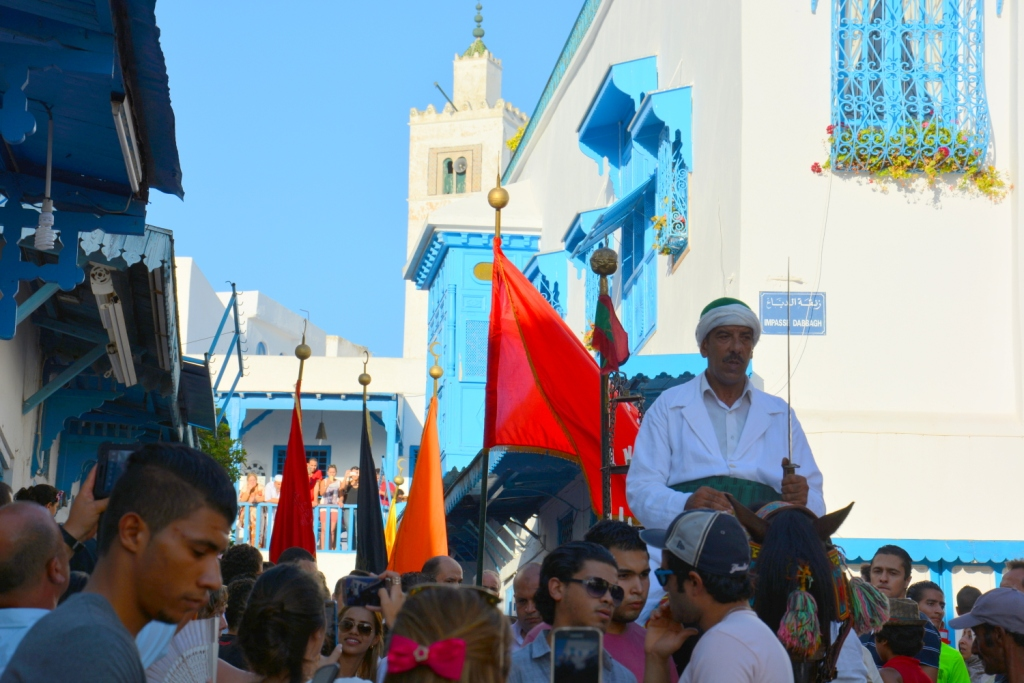 Kharja de Sidi Bou Said 2015